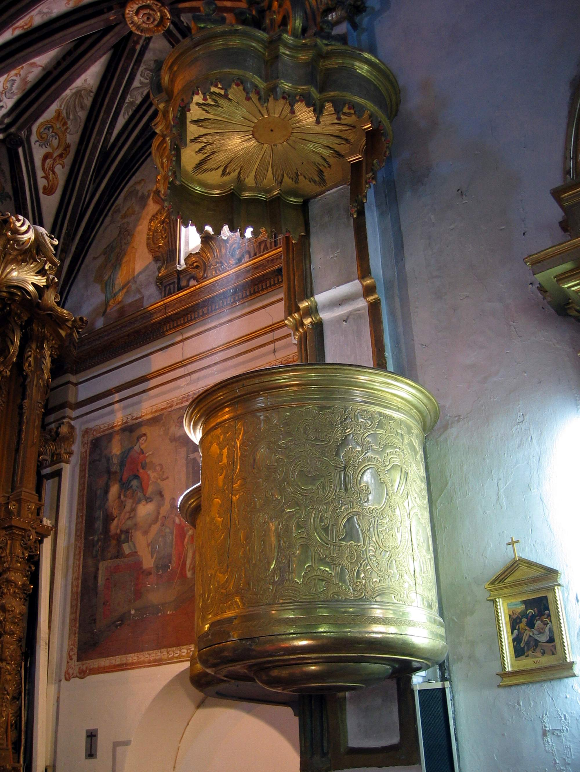 Detalle de púlpito en la iglesia del Monasterio de Tejeda, Garaballa (Cuenca), año 2015.